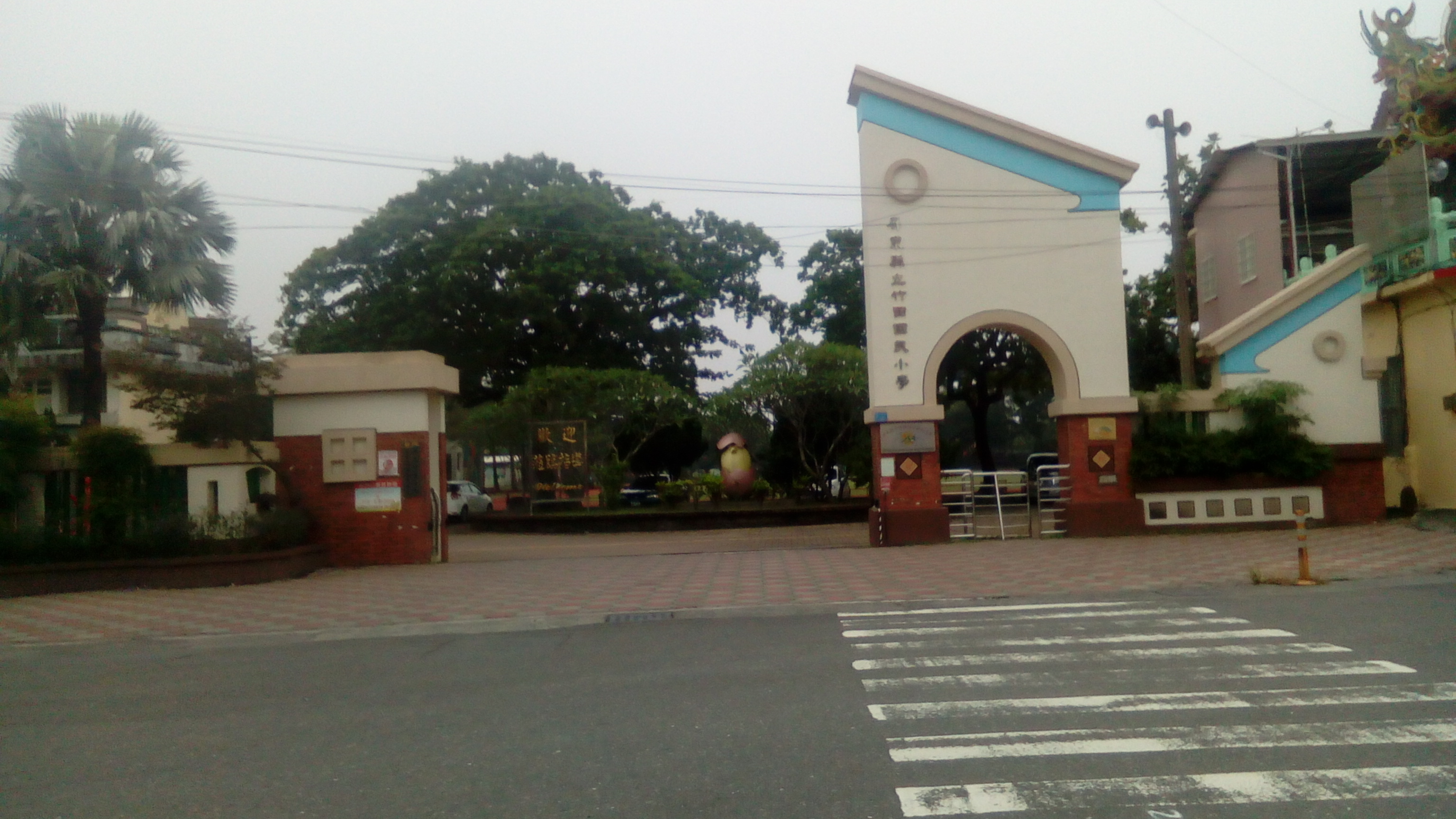 竹田市區